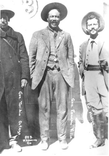 Generales Toribio Ortega, Villa y Coronel Juan Medina.